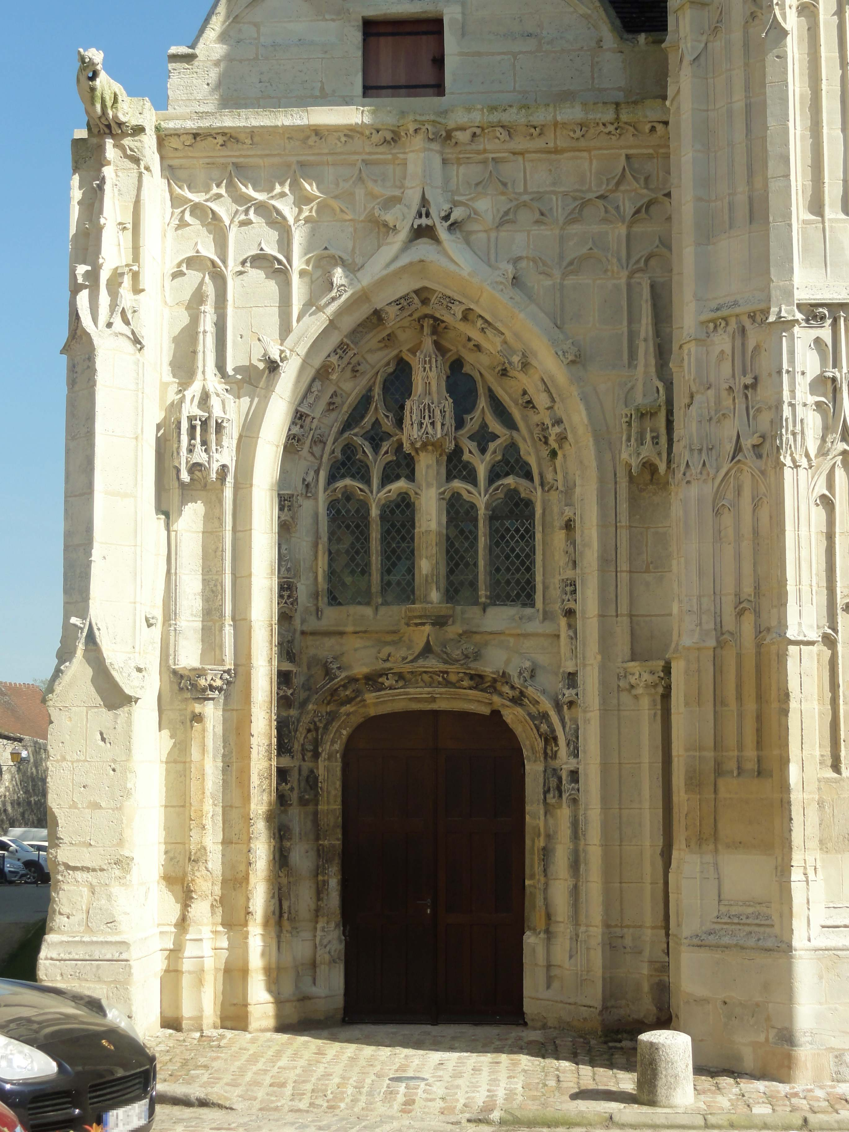 Église Saint-Pierre de Senlis - voir le titre du fichier.